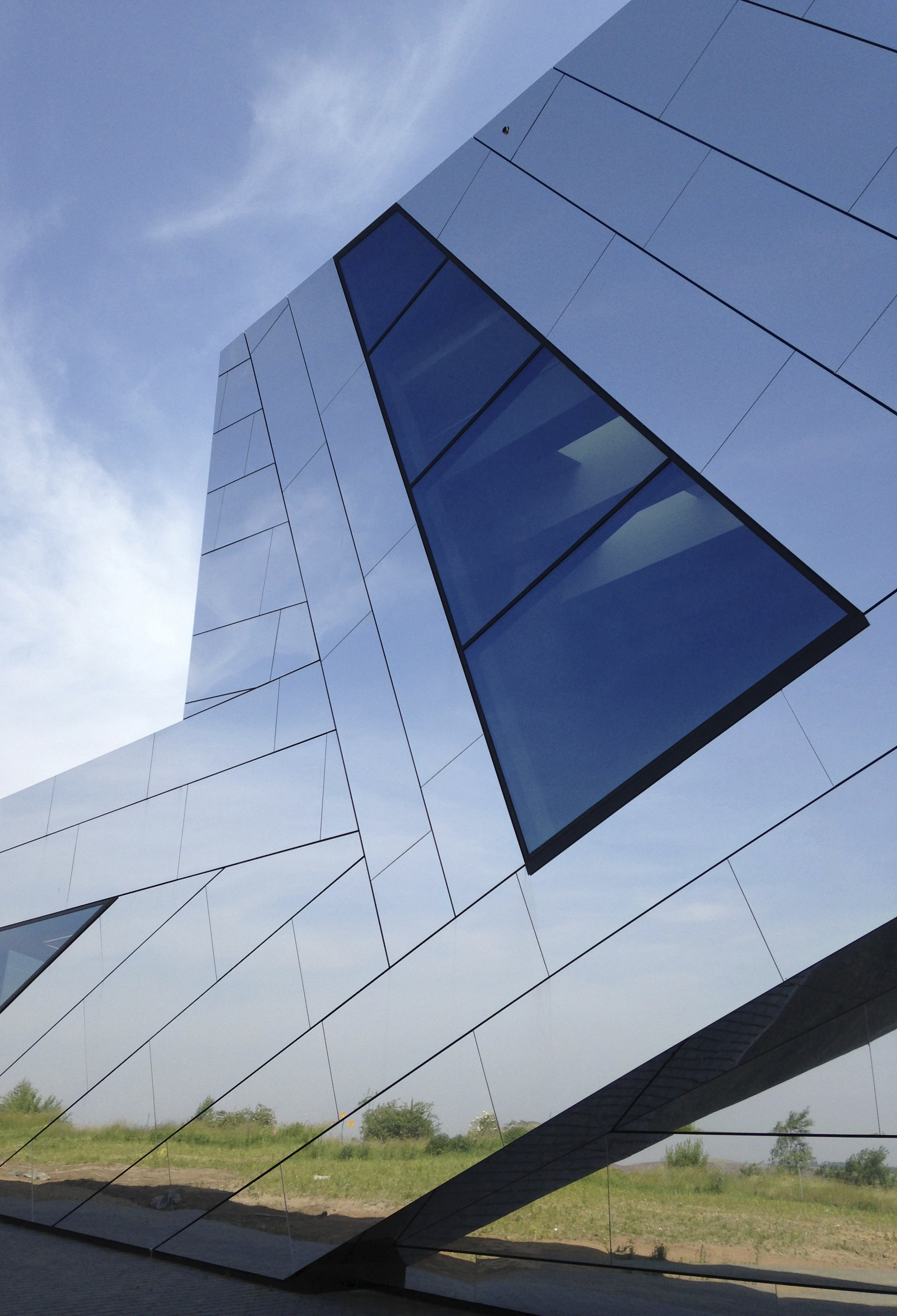 Nahaufnahme der Fassade des Forschung- und Erlebniszentrums Schönlinge Speere